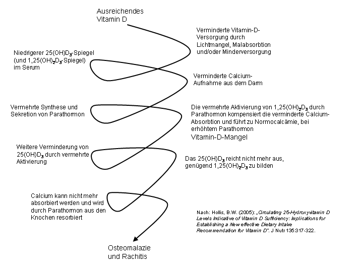 Spirale von einer ausreichenden Vitamin-D-Versorgung bis zur Osteomalazie